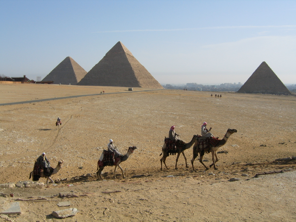 ギーザのピラミッド地区を進む駱駝の隊商。遠くにカフラー王のピラミッド 〔中央〕 が見える。